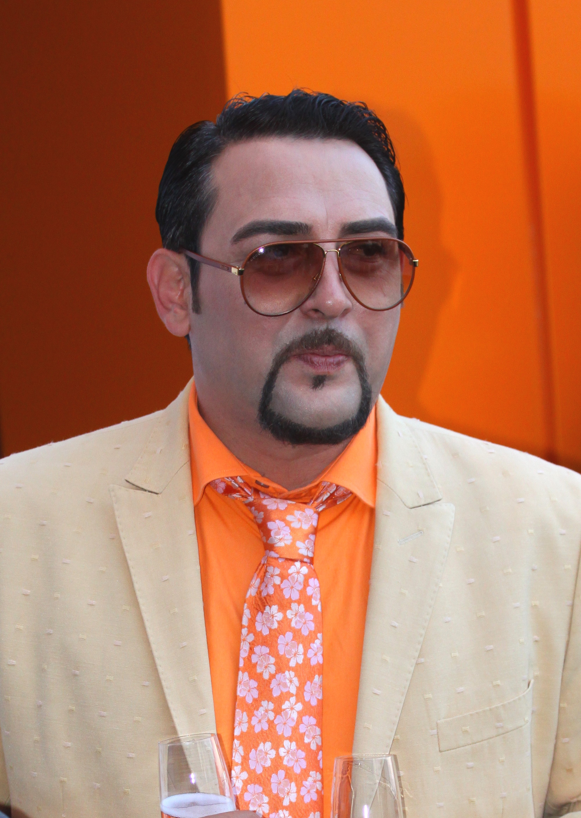 Иван Георгиев Динев, познат на публиката с артистичния си псевдоним Устата, е български рапър.